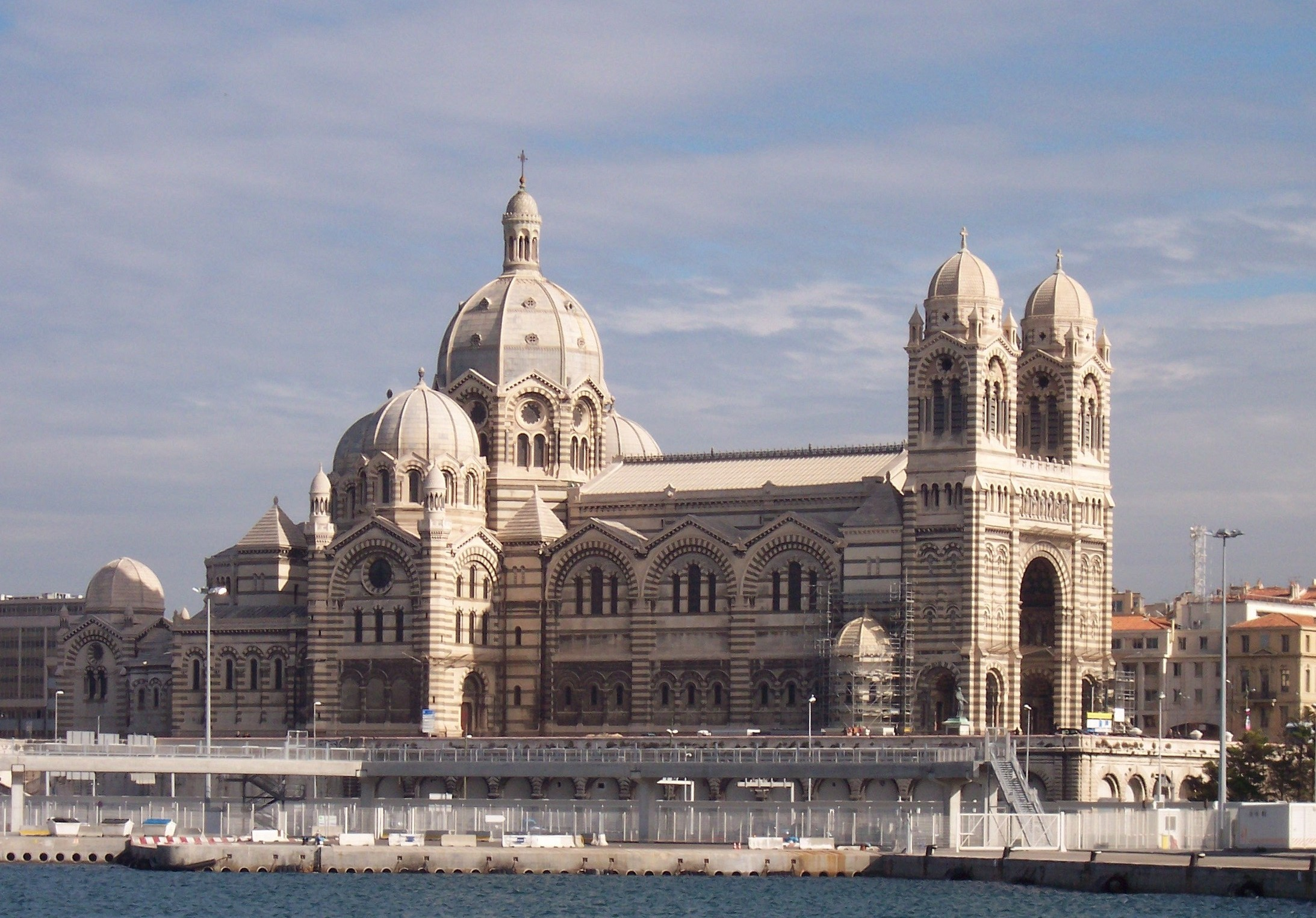 Cathédrale Sainte-Marie la Majeur de Marseille